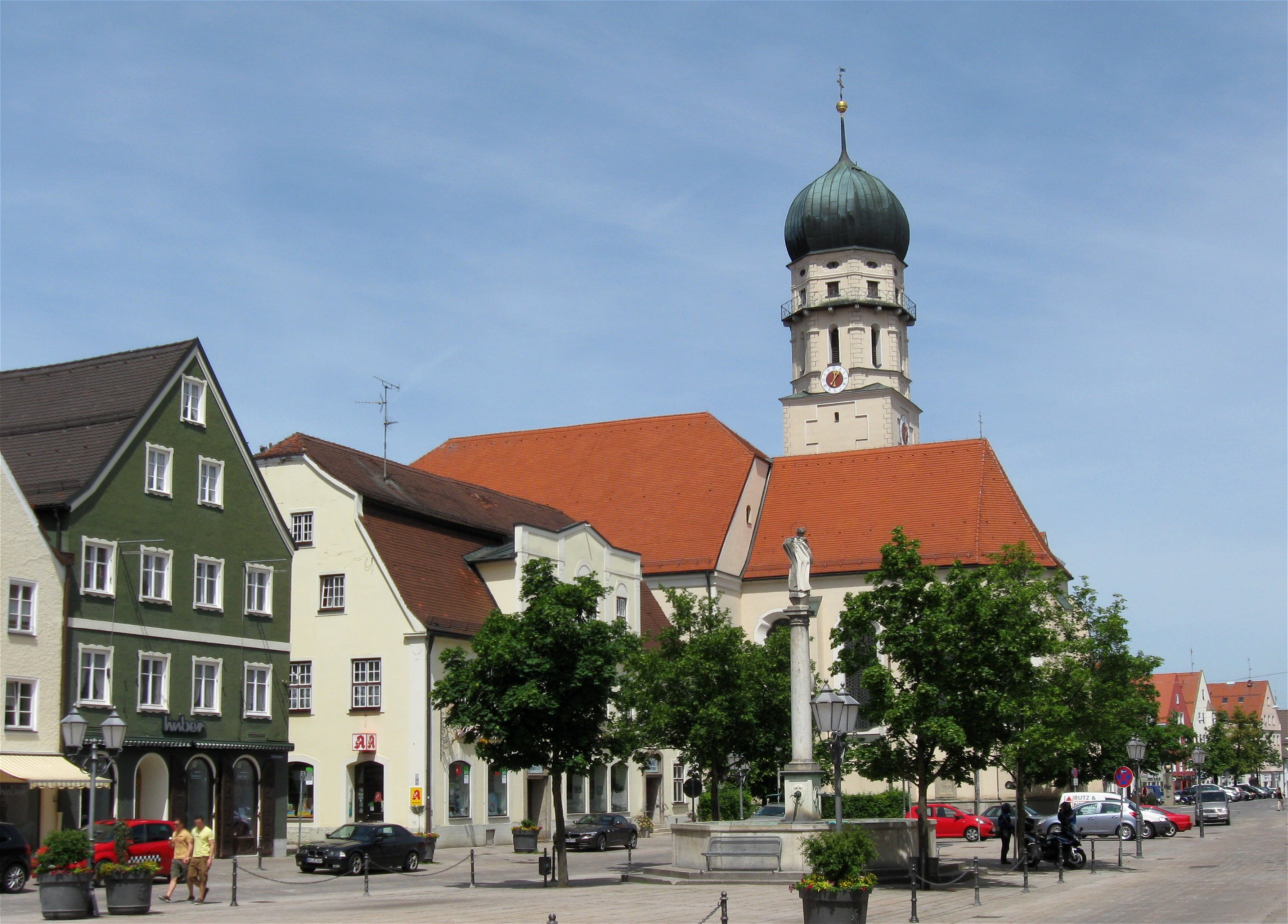 Marienplatz; im Hintergrund Mariä Himmelfahrt